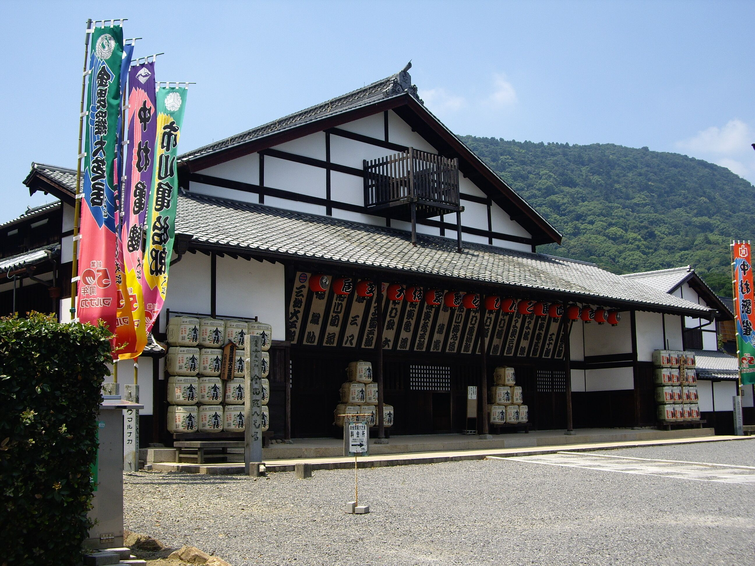 旧金毘羅大芝居 - 金刀比羅宮（香川県琴平町）の門前町にある劇場。古くからの舞台装置を用いて歌舞伎が公演されている。